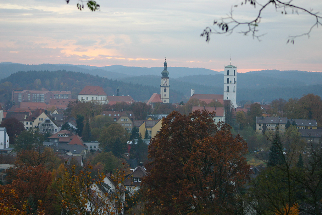 Sulzbach-Rosenberg, Blick vom Annaberg auf die Kirchen im Stadtteil Sulzbach Originalgröße: 3072 x 2048 (Für Web herunterskaliert)